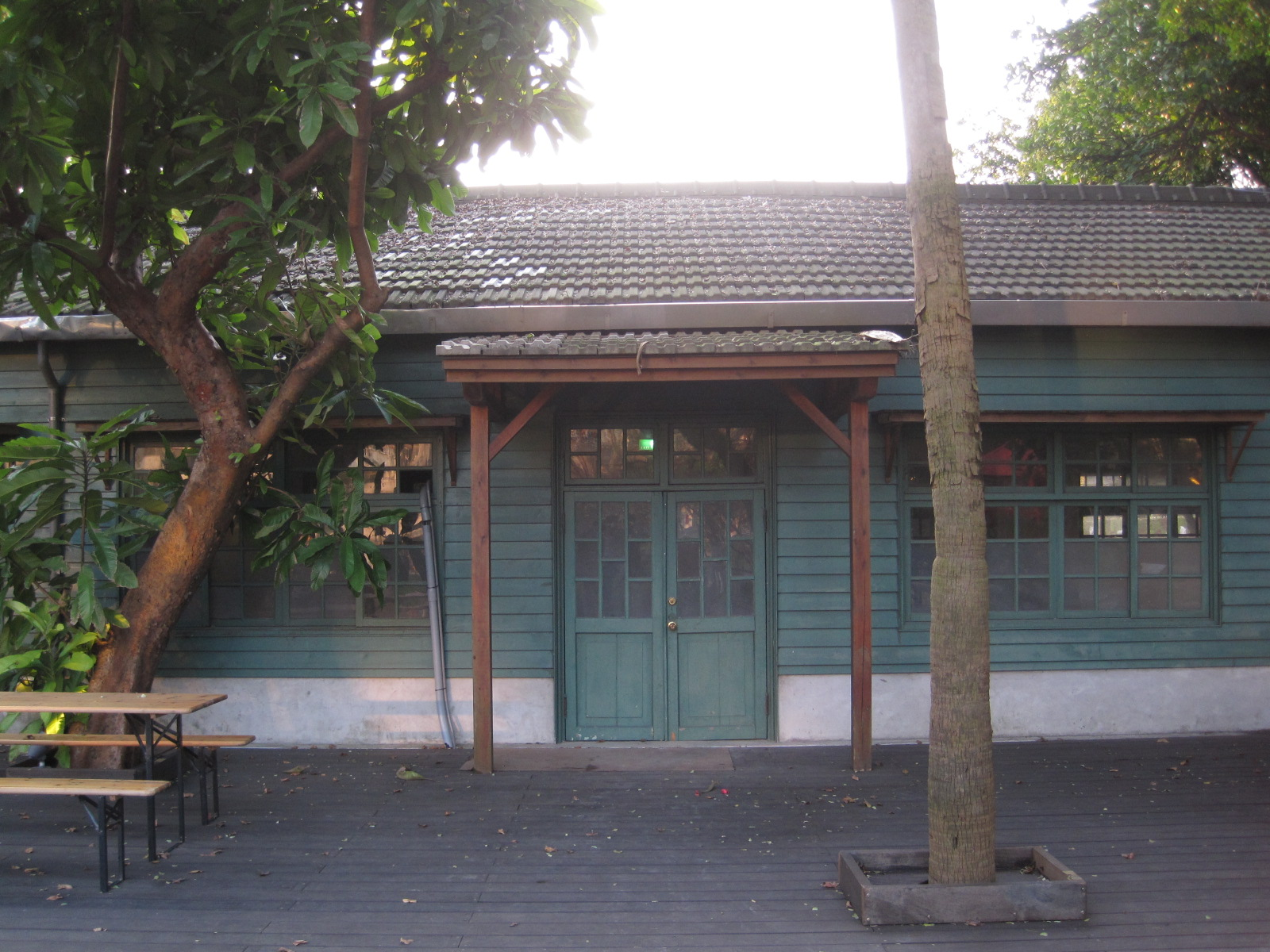 中文（台灣）: 松山菸廠育嬰室。